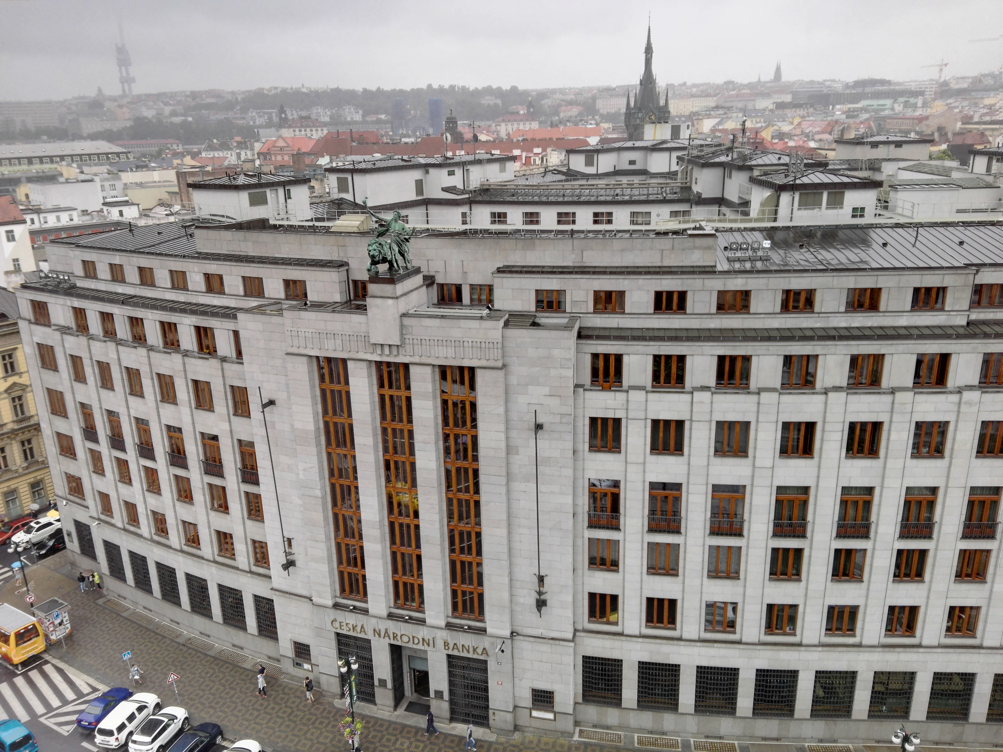 Façade principale du siège de la Banque nationale tchèque à Prague, vue depuis la tour poudrière.